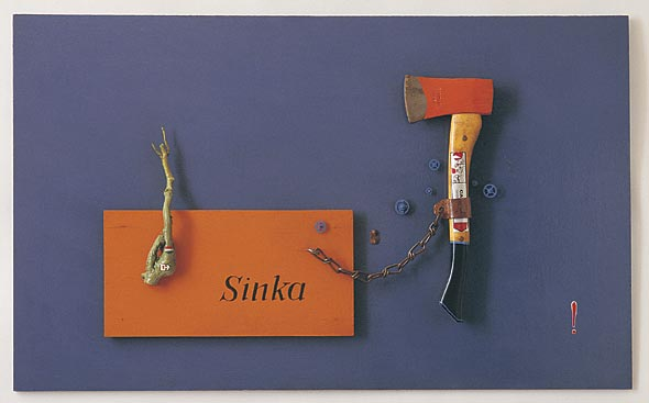 id. Szlávics László: Sinka István emlékére, vegyes technika, 100X60 cm , 1975 Laszlo Szlavics Sr.: In memory of István Sinka, mixed technique, 100x60 cm, 1975